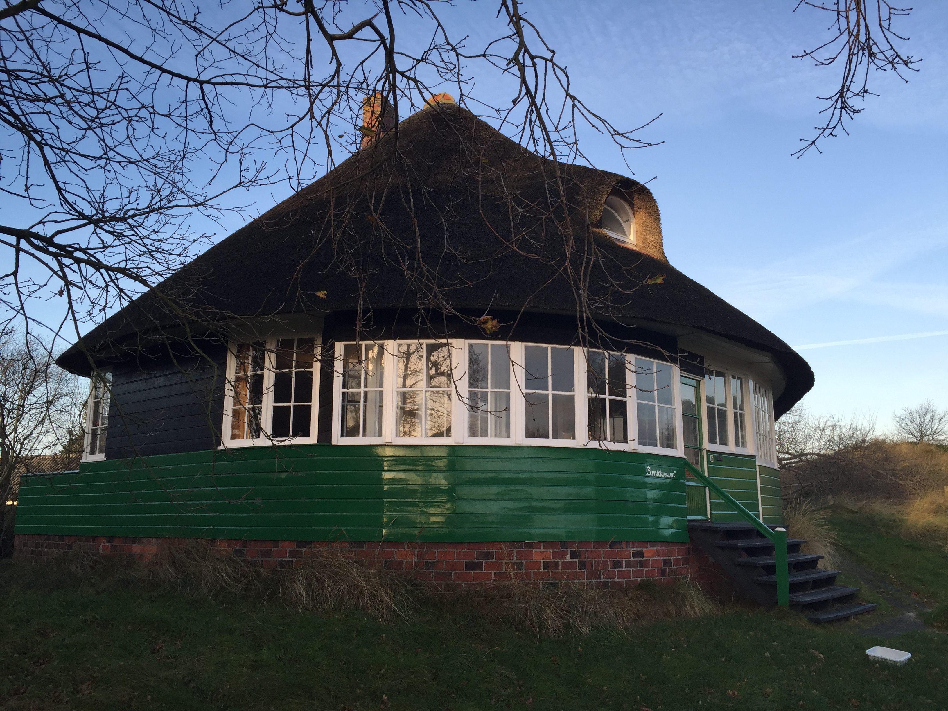 Recreatiewoning "Canidunum", Duinweg 15, Nes, Ameland. Architect Tj. Venstra, plm 1935. Exterieur voorzijde. Foto december 2015.